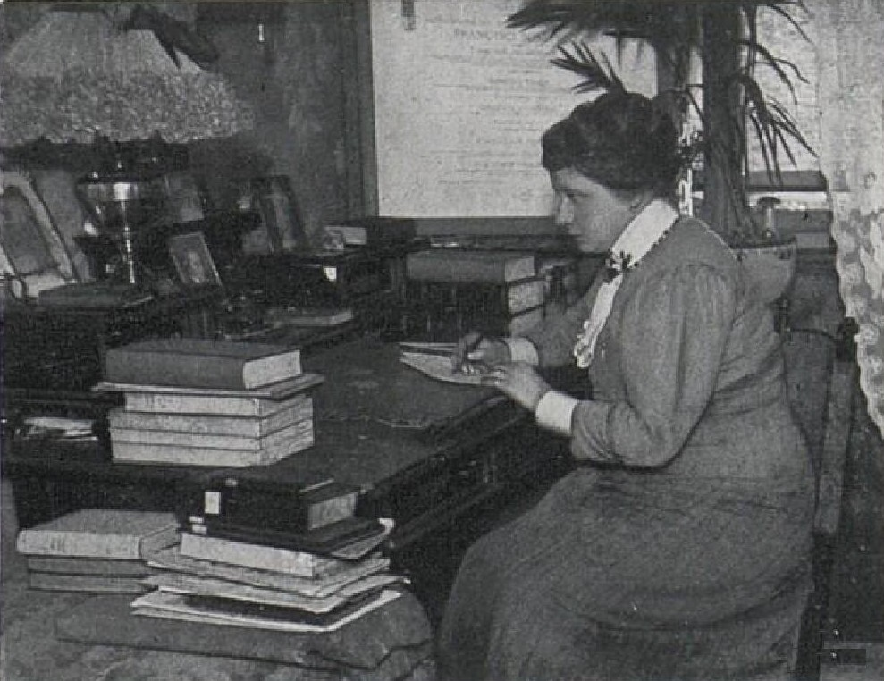 Kamila Spalová (1871-1953), česká učitelka, vědecká pracovnice v oblasti pedagogiky, feministka, historička, ředitelka městského muzea v Rakovníku, autorka pedagogických a vlastivědných prací